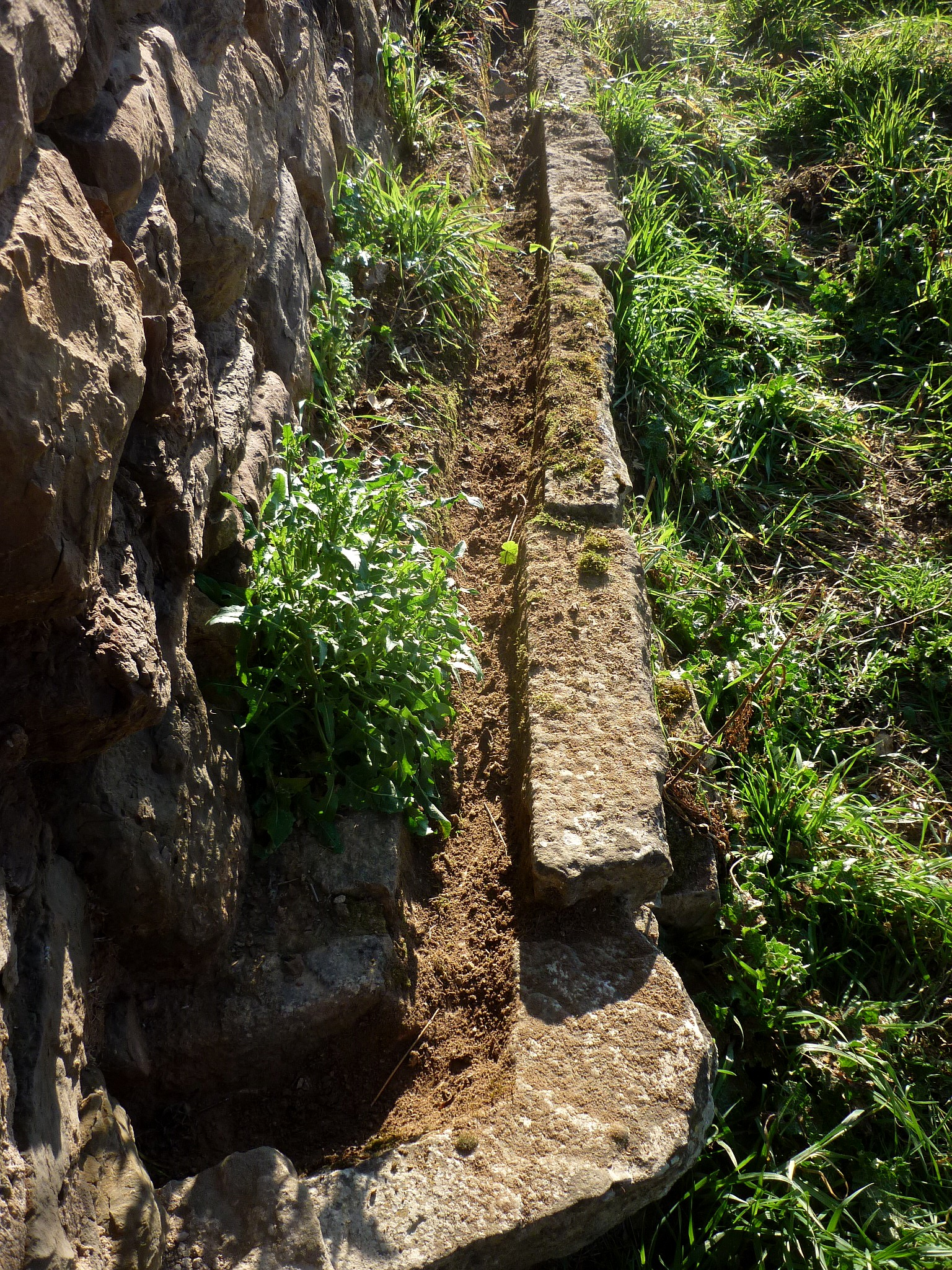 Aqüeducte dels Frares (Torà): tram visible de la conducció d'aigua